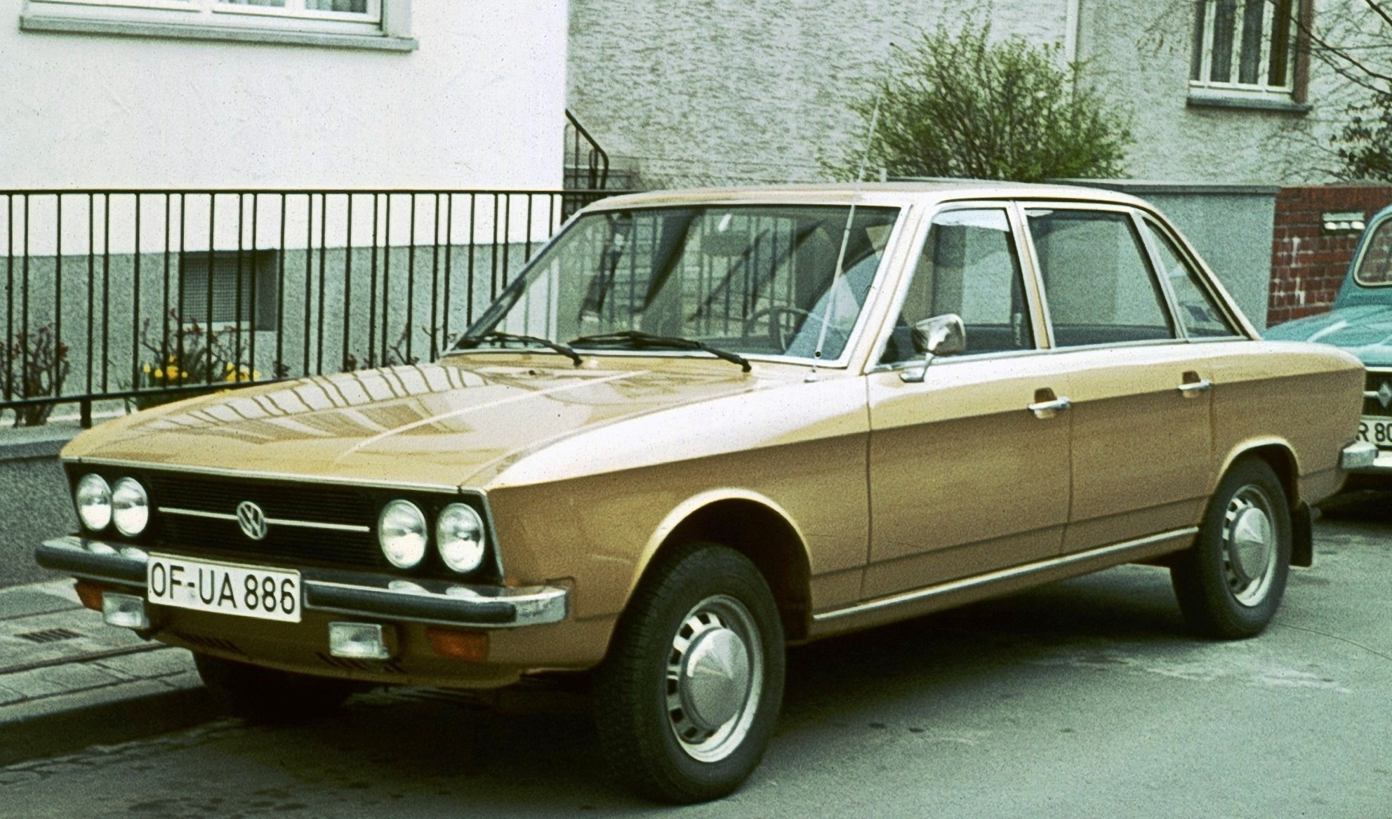 VW K70